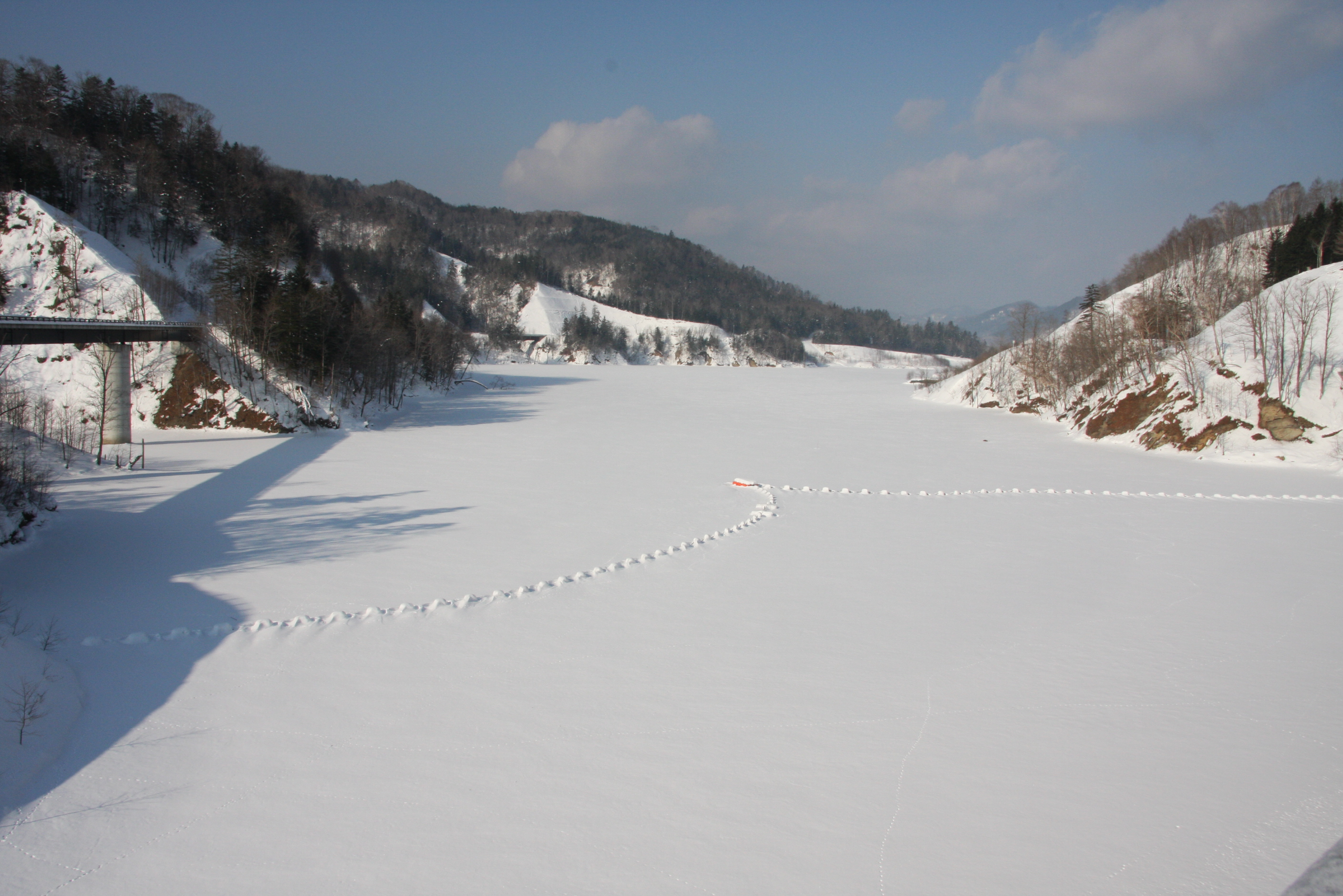 Green Lake 庶路 （庶路ダム湖）